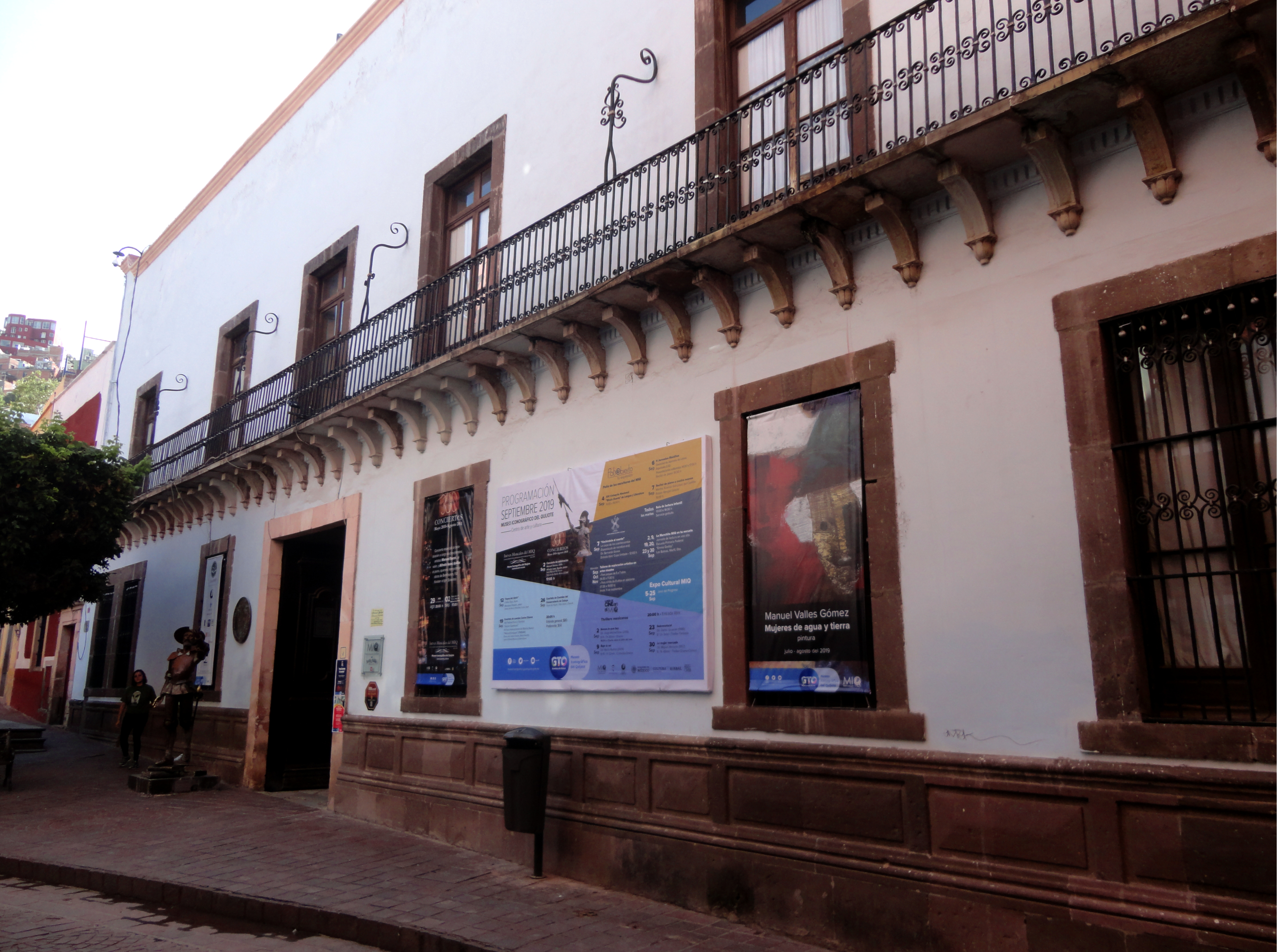 Museo Iconográfico del Quijote, Guanajuato Capital, Guanajuato, México.